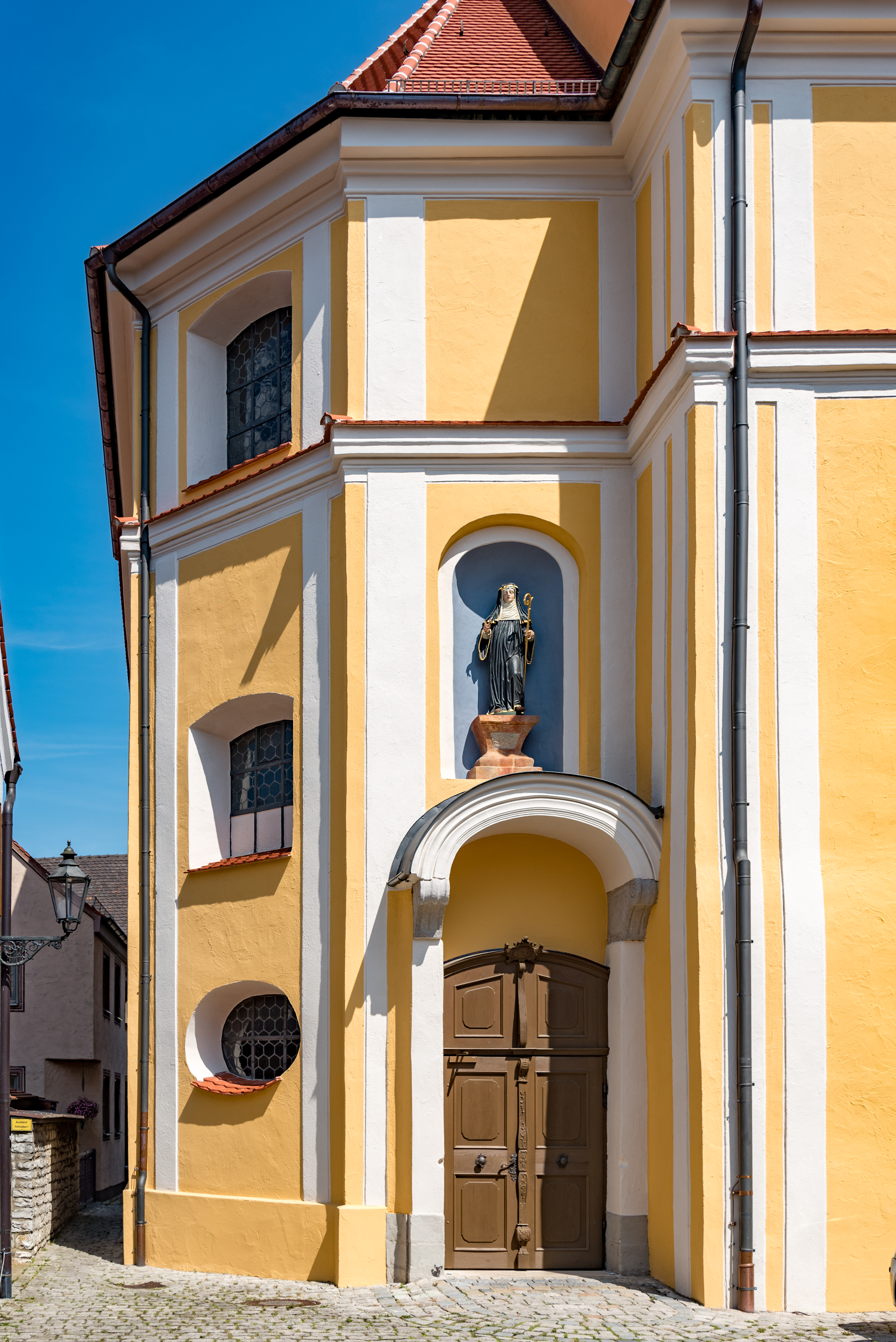 Berching, Dr.-Grabmann-Platz 1, Pfarrkirche Mariä Himmelfahrt